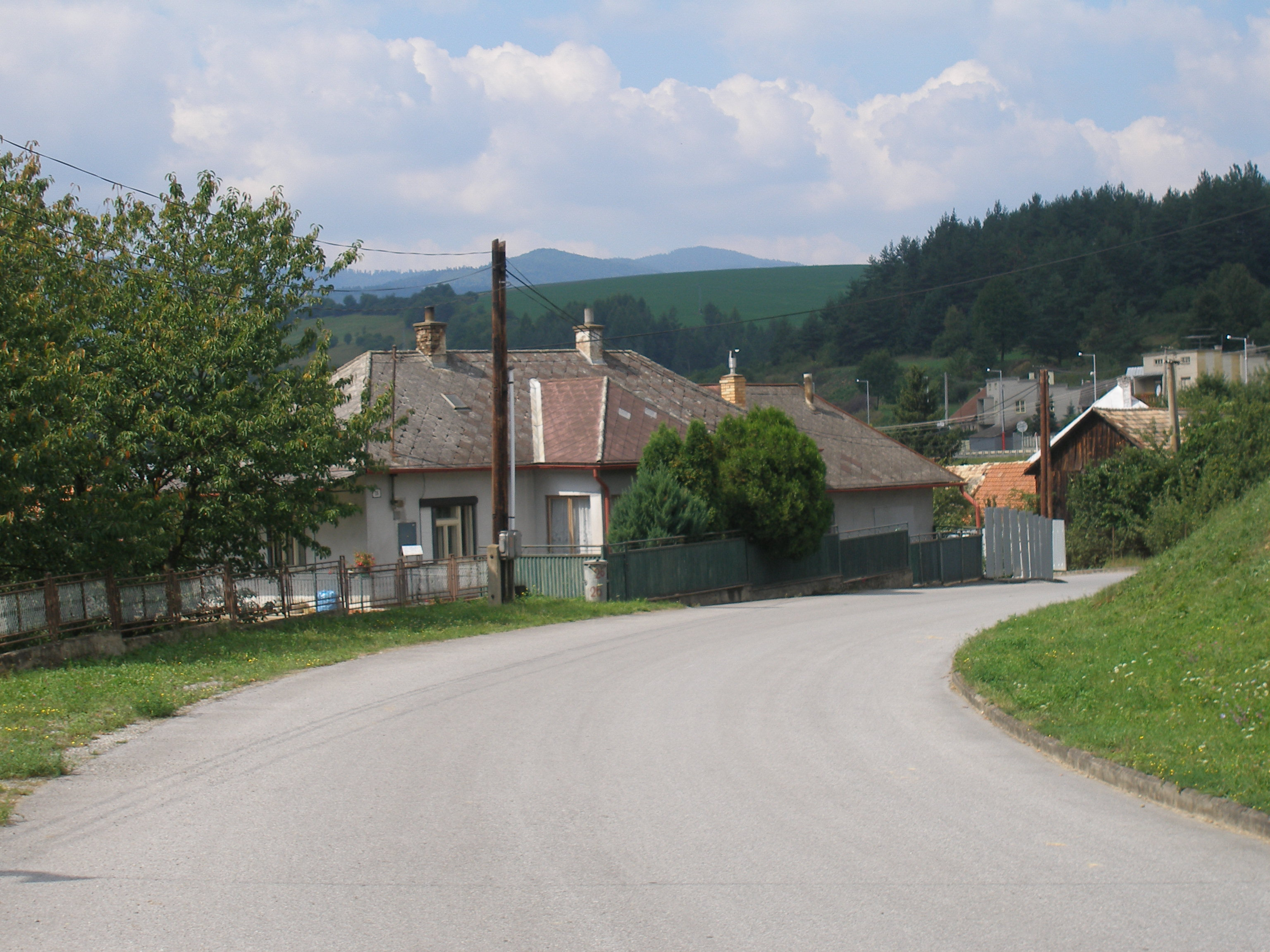 Šarišská obec Hendrichovce